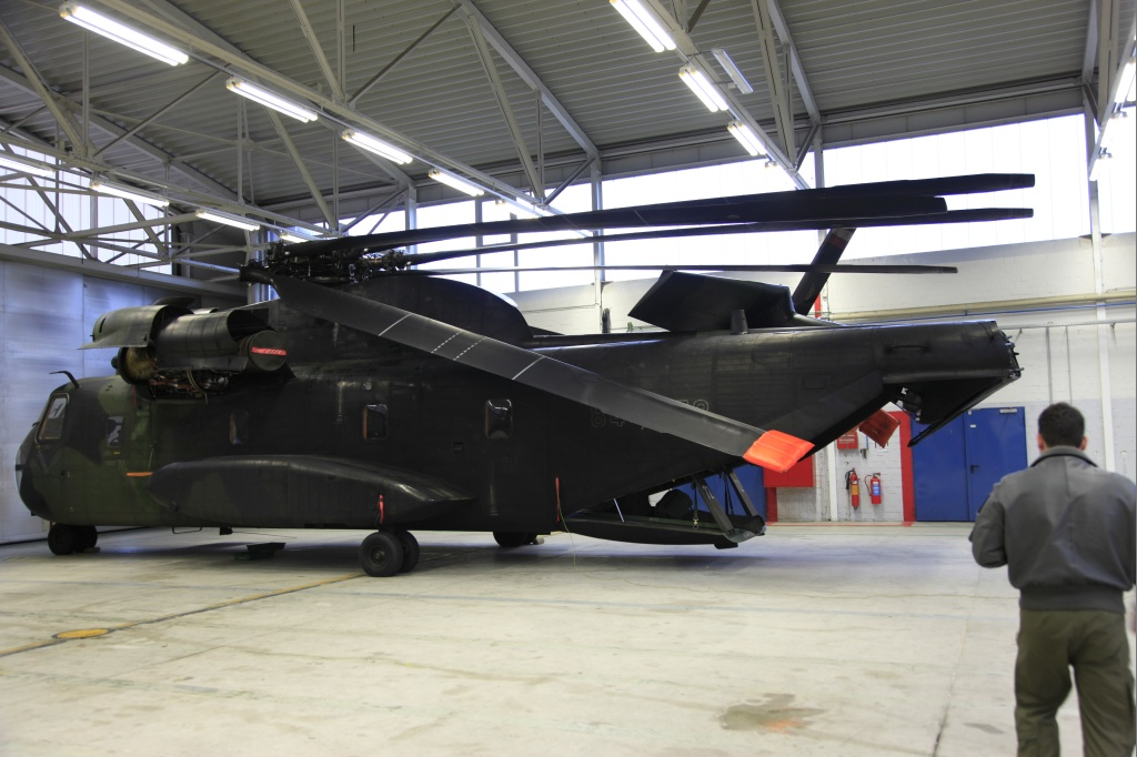 Hubschrauber gefaltet in der Halle